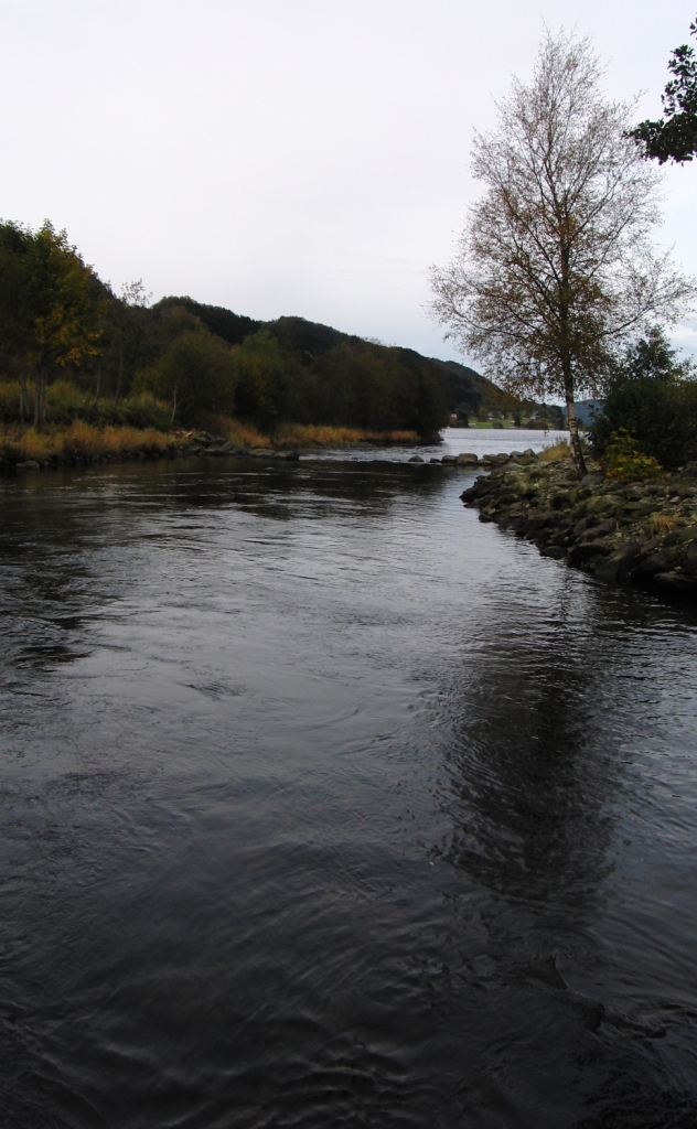 Storelva (Arnaelva) i Arna, Bergen, Norway.